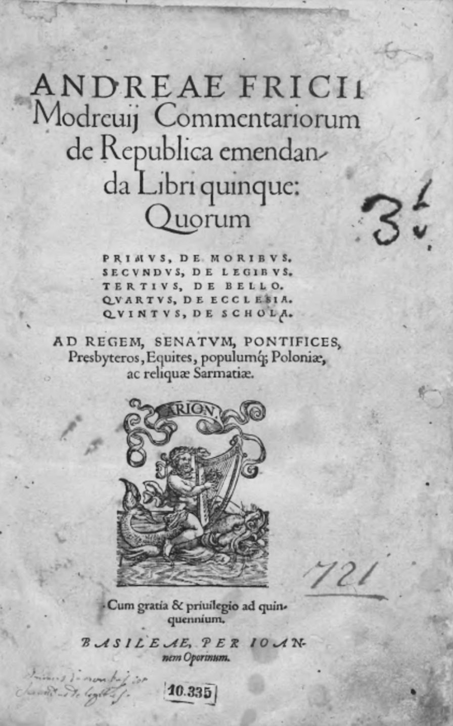 Strona tytułowa egzemplarza De Republica Emendanda 1554 z Ossolineum